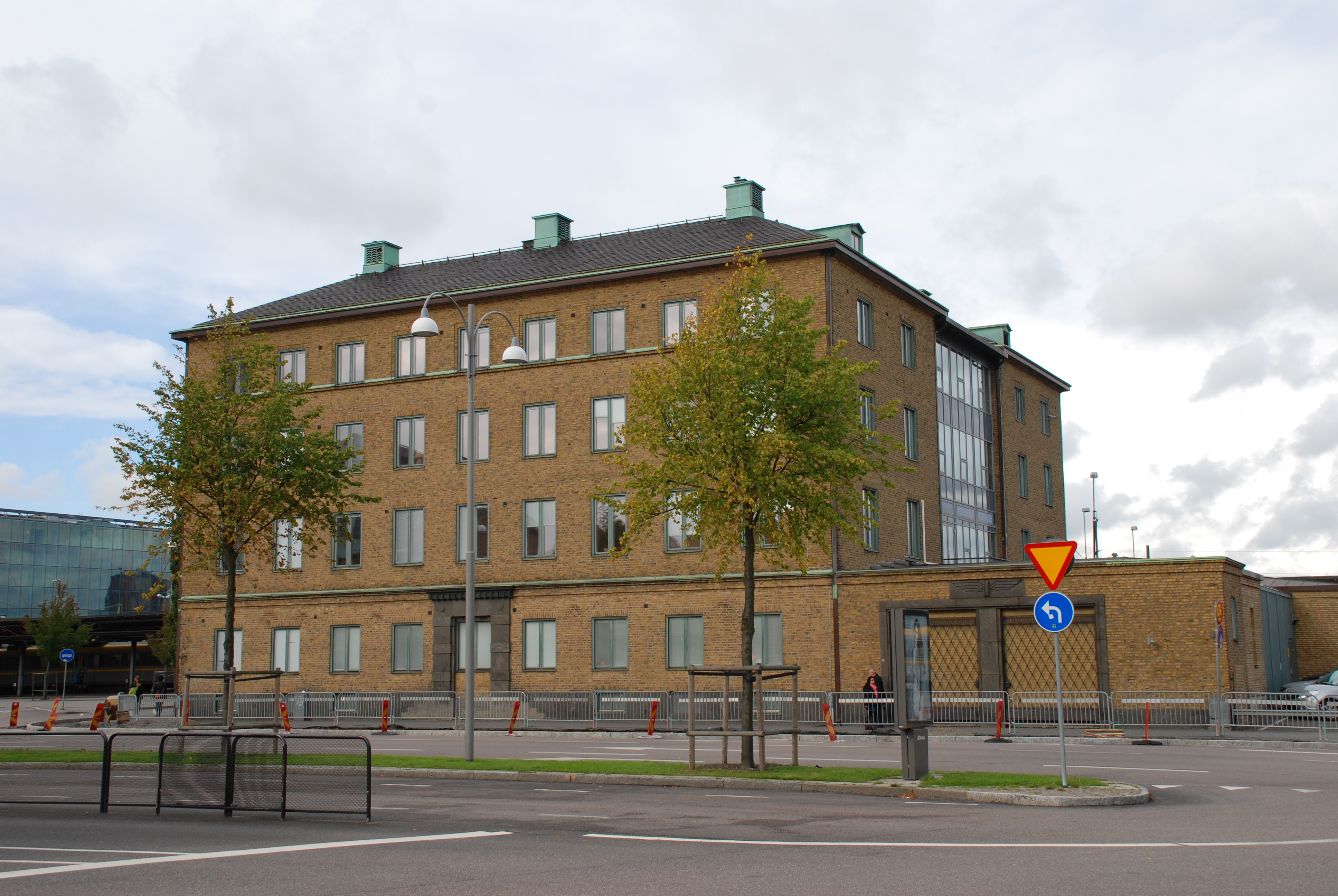 Västgötabanans stationshus vid Polhemsplatsen i Göteborg.